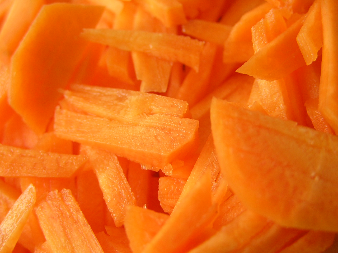 Carrots Julienne.